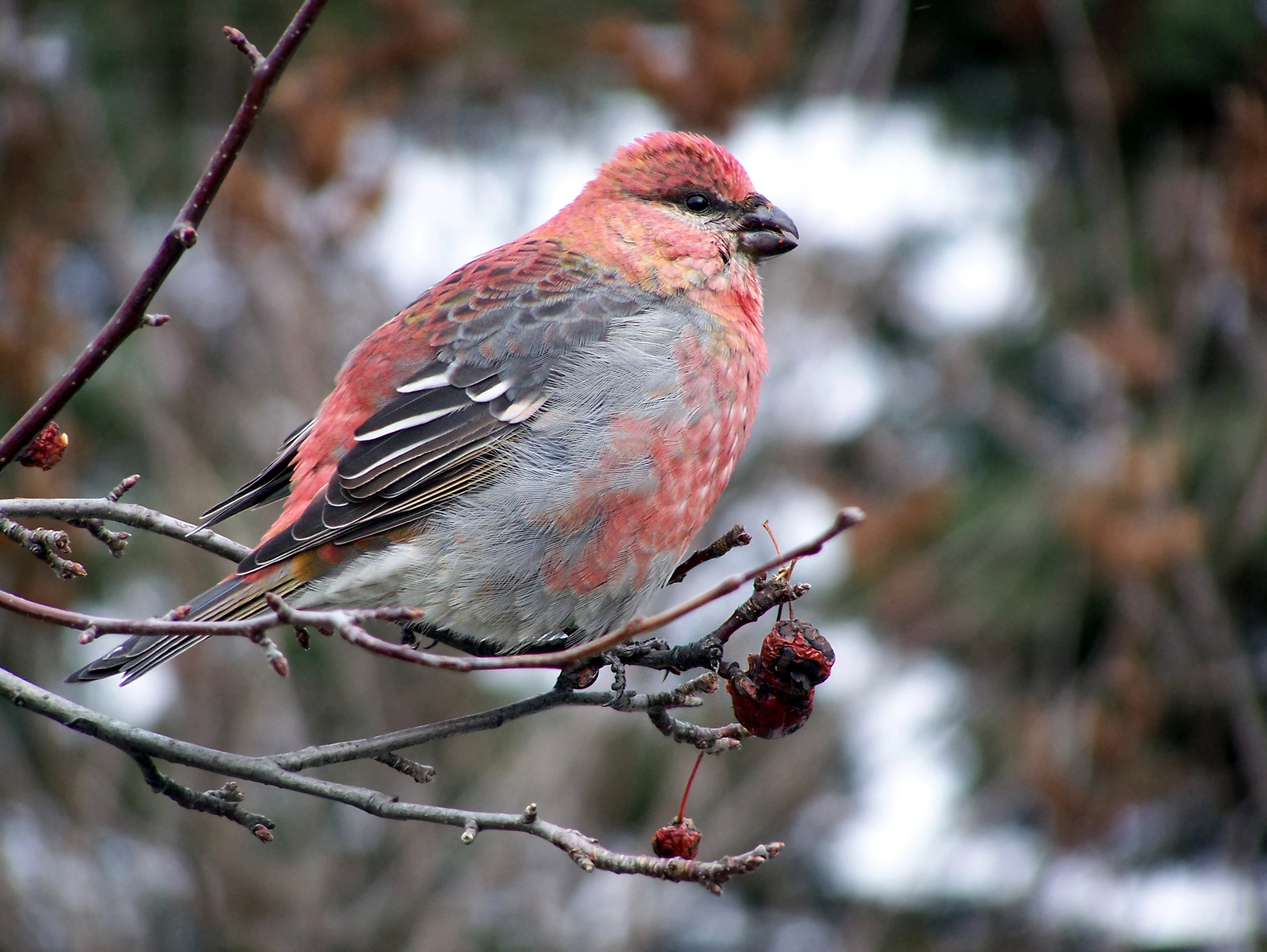 Pine Grosbeak (Pinicola enucleator)